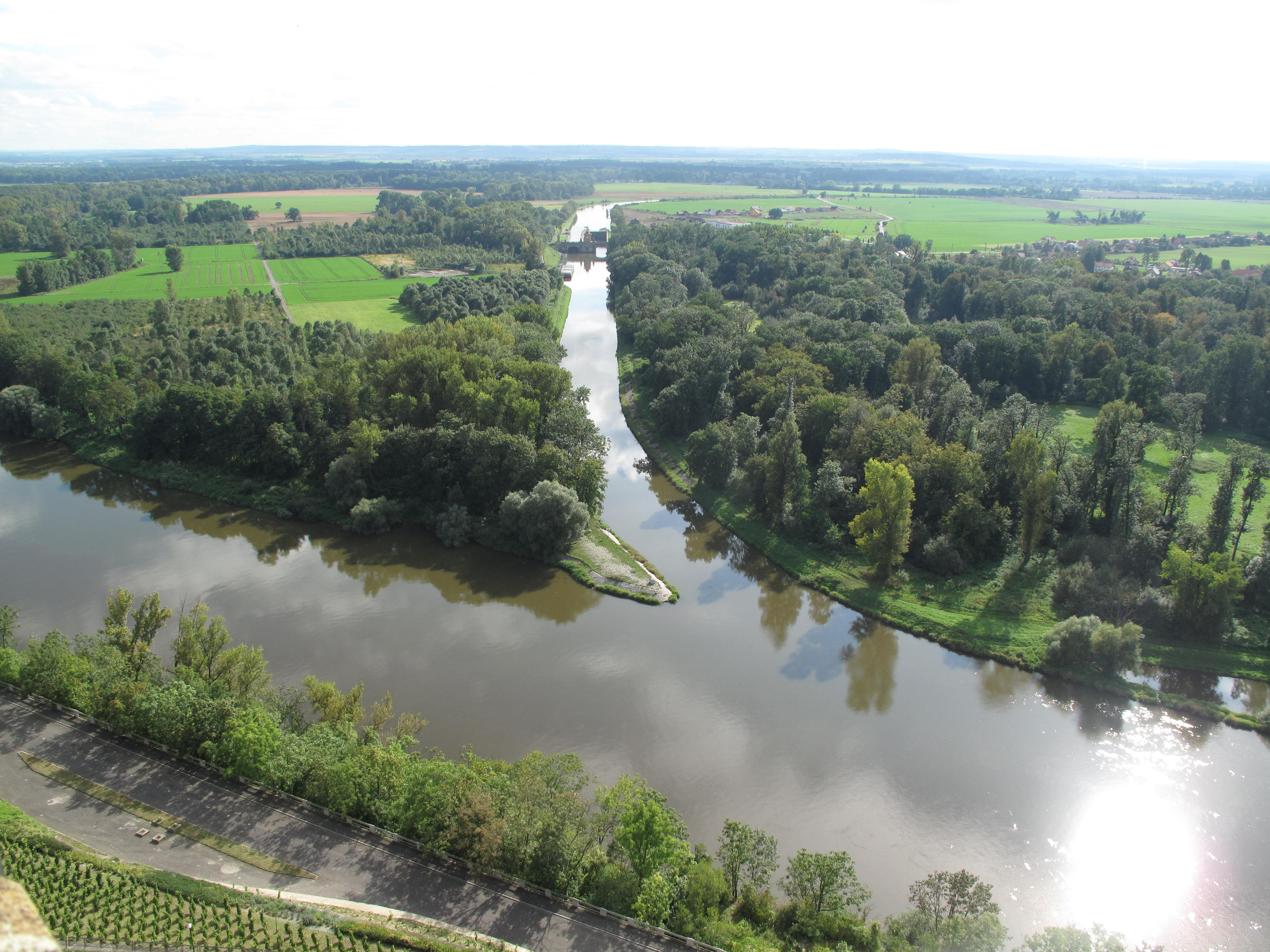 Mělník